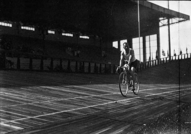 Championnats du monde de cyclisme sur piste 1930 : stade du Heysel : Lucien Michard fait un tour de piste